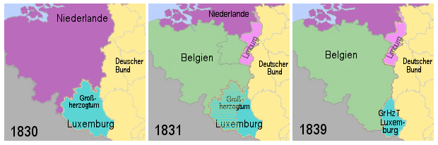 Niederlande 1830, Belgien 1931, Herzogtum Limburg, Deutscher Bund